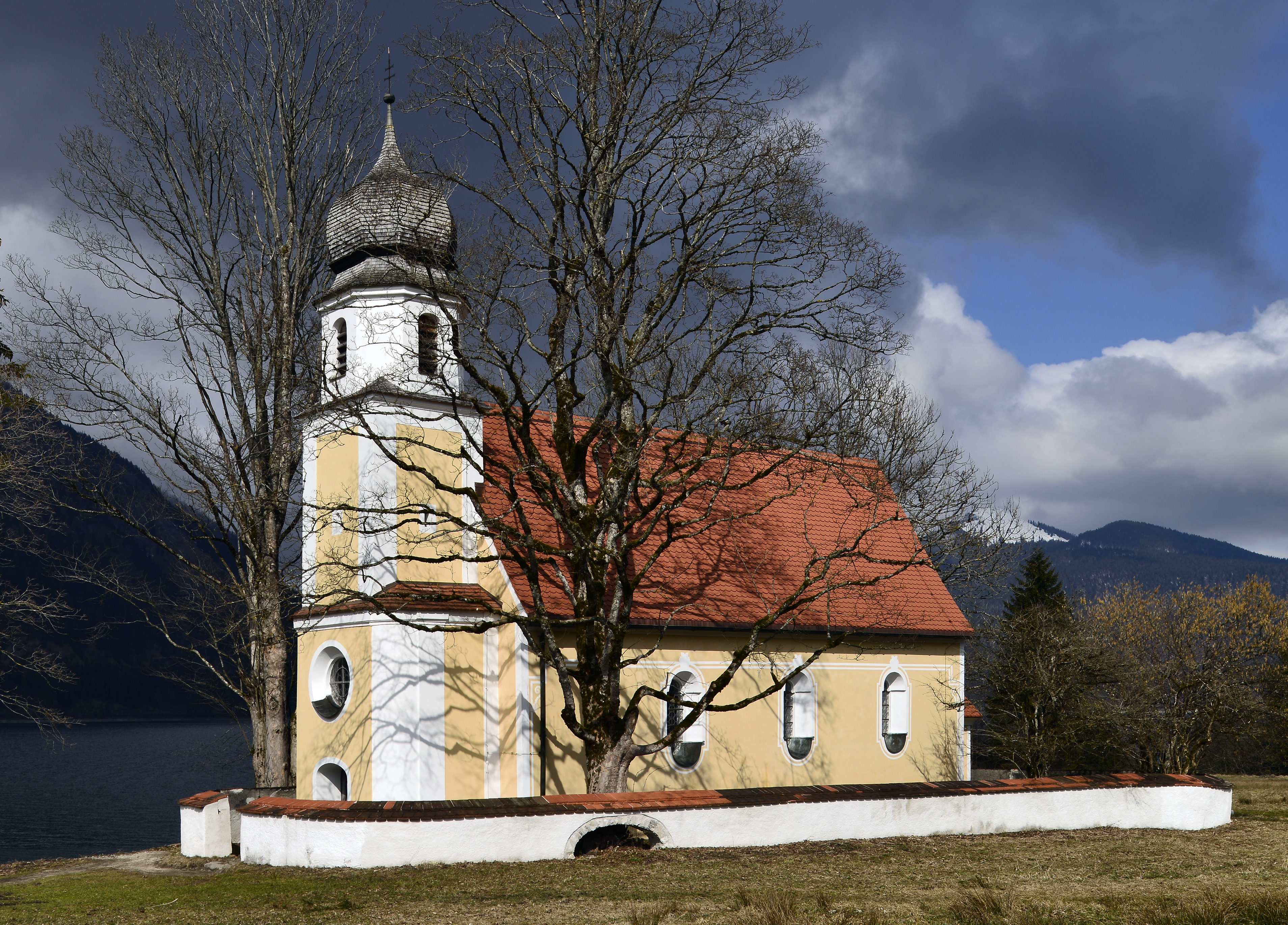 Deutschland, Oberbayern, Walchensee, Zwergern, Anschrift - Zwergern 5. Die Kirche Sankt Margareth. Zustand 2016. Nach der renovierung in den Jahren 2014 und 2015.